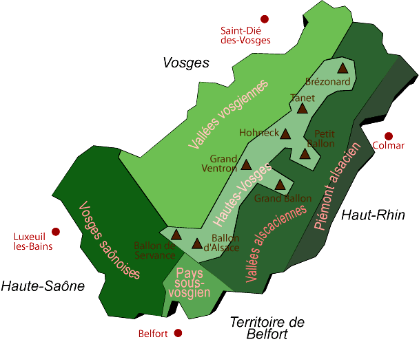 Image réalisée par versgui le 8 octobre 2005. . Réunissant 208 communes et une population totale de 256 000 habitants, il est à cheval sur quatre départements : Haut-Rhin, Haute-Saône, Vosges et Territoire de Belfort. Ses 3 000 km² en font l'un des plus vastes de France. Le parc englobe le sud du massif vosgien, depuis la vallée de Sainte-Marie-aux-Mines jusqu'aux portes de Belfort et de Luxeuil-les-Bains et s'organise autour des Hautes Vosges, la partie la plus élevée du massif, comprenant les 14 sommets dépassant 1 300 mètres d'altitude. C'est l'un des plus grands et des plus peuplés des parcs naturels régionaux français ; il borde et inclut en effet en partie plusieurs unités urbaines de la plaine d'Alsace et de la trouée de Belfort, comme Colmar, Mulhouse et Belfort.